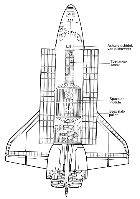 Spacelab - NASA, Nederlandse vertaling